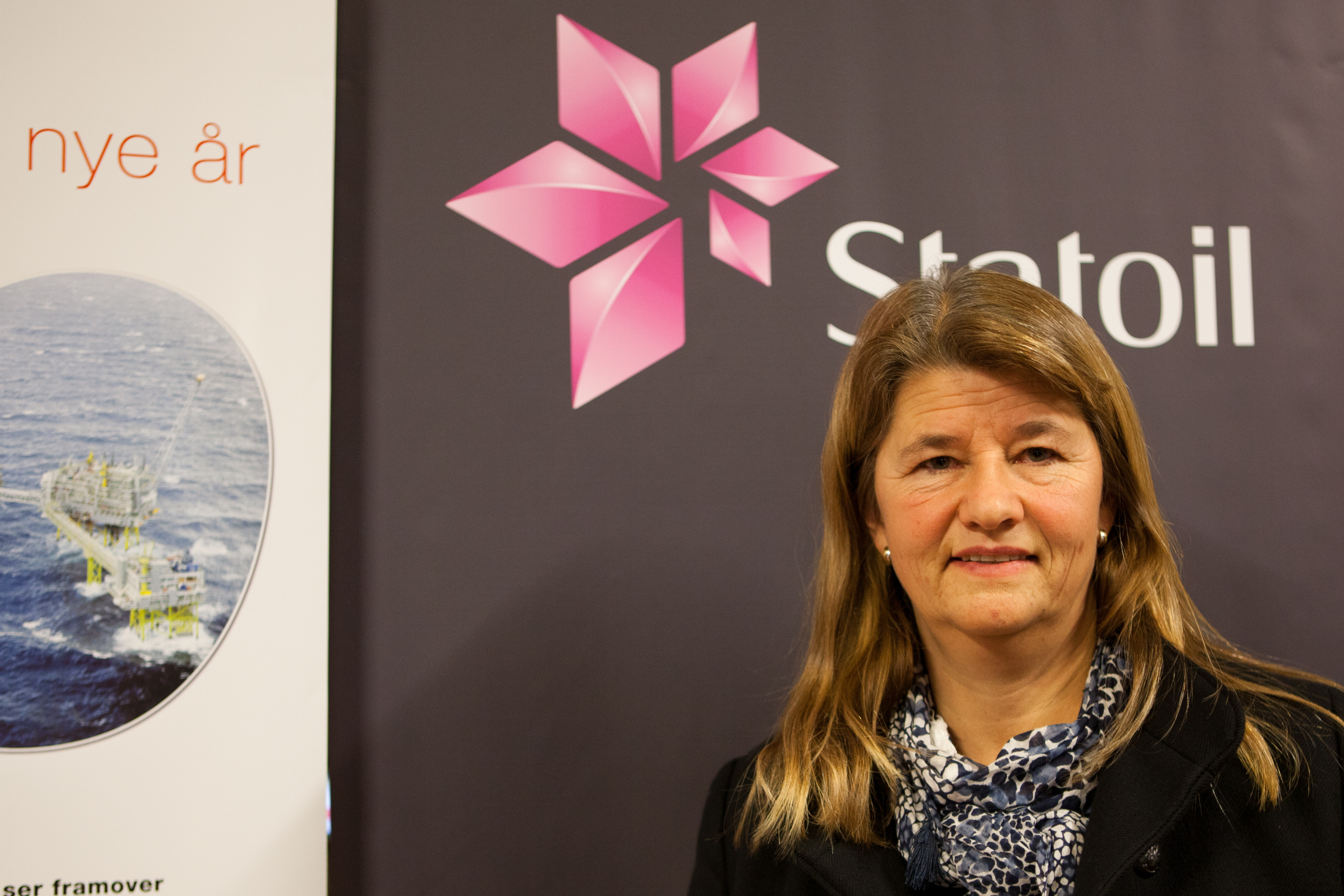 Ung Energi 2011 ble åpnet av Margareth Øvrum, konserndirektør teknologi, Statoil ASA